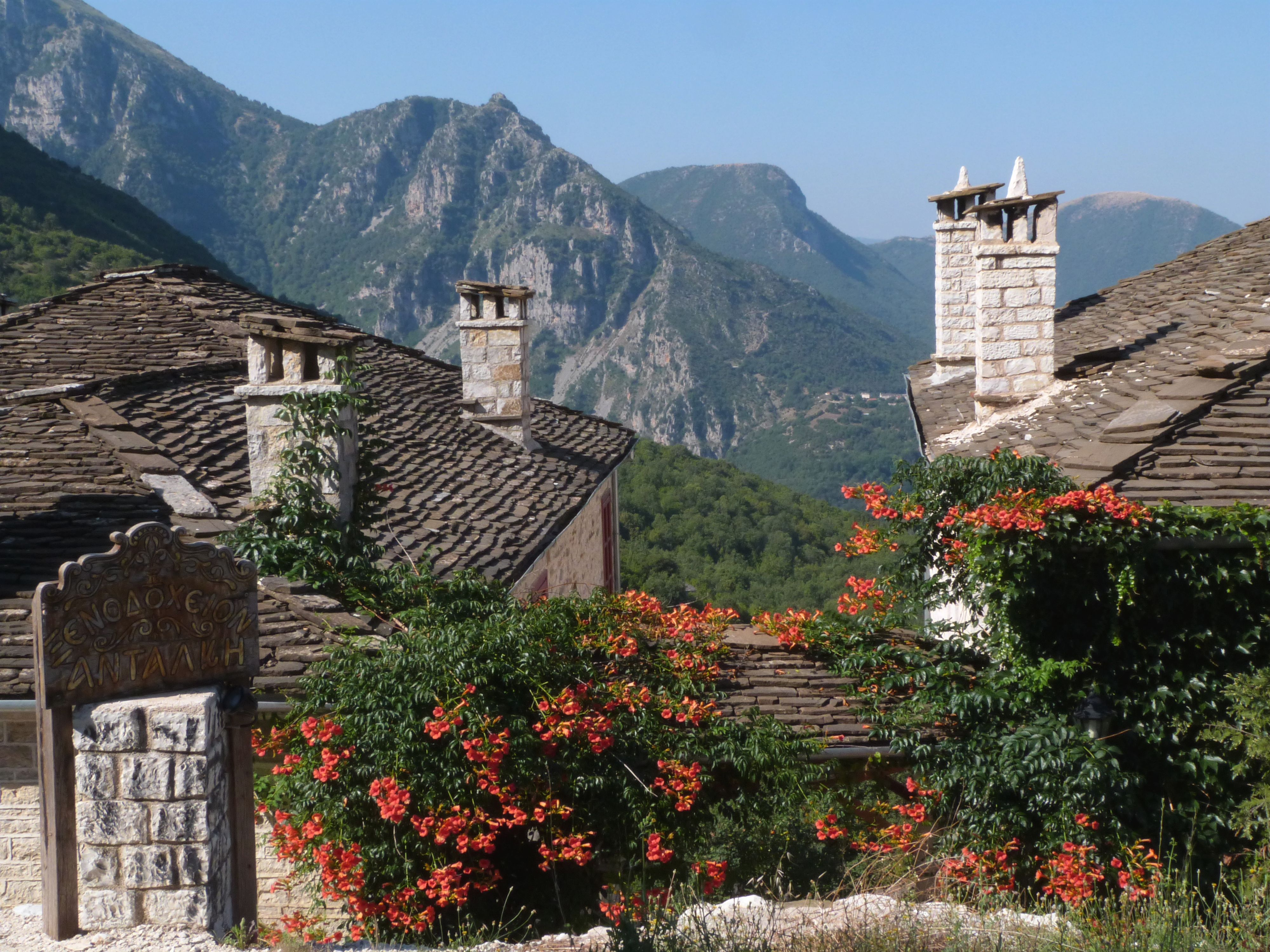 Papigo/Epirus